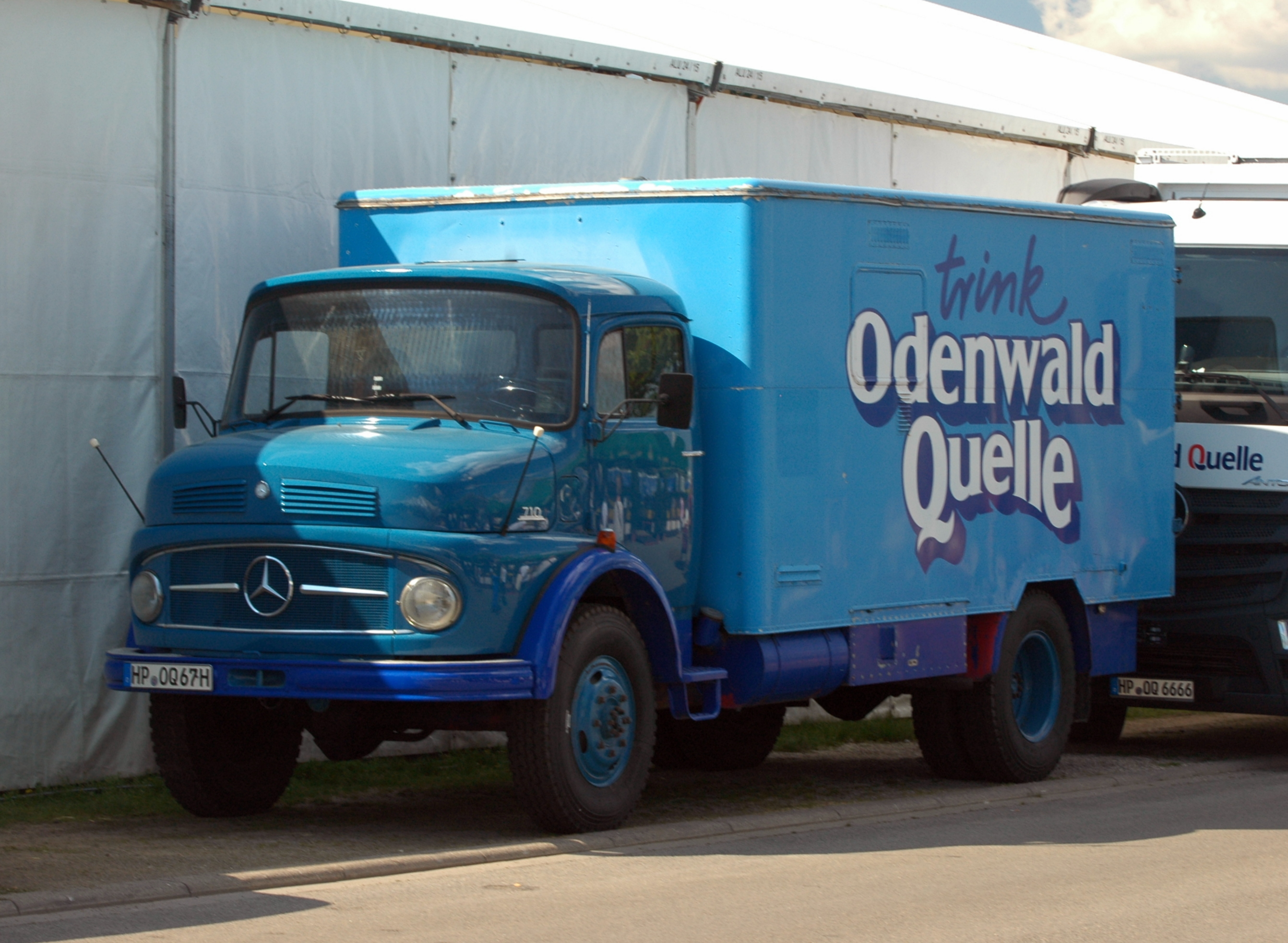 Maimarkt Mannheim 2016: Mercedes-Benz 710 - Odenwald Quelle